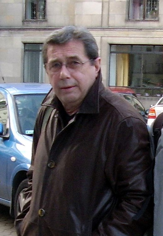 Janusz Gajos (ur. 23 września 1939 w Dąbrowie Górniczej) - polski aktor teatralny i filmowy